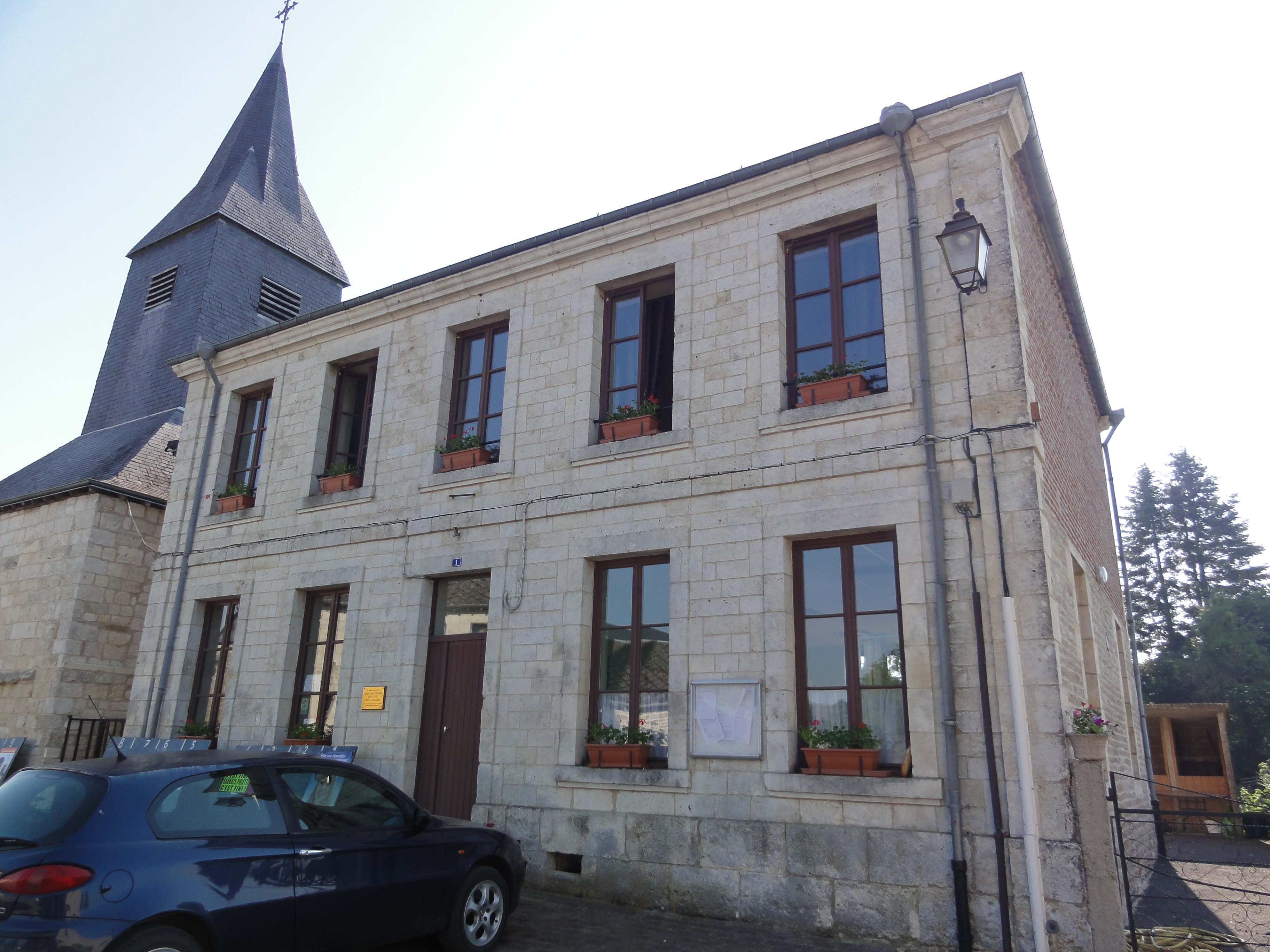 Estrebay (Ardennes) Mairie